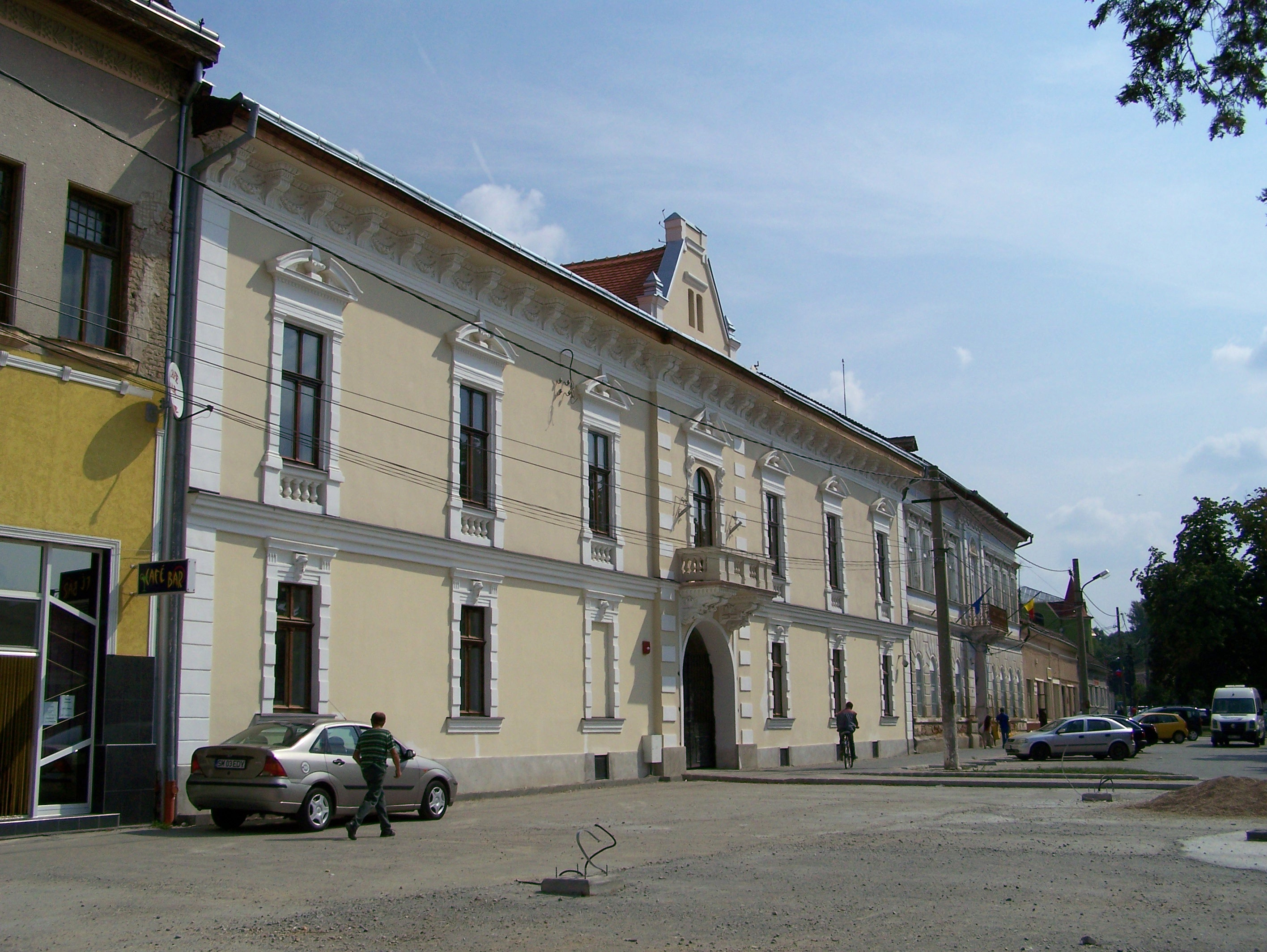 Hanul „Steaua de Aur”, azi cazarma unității de grăniceri